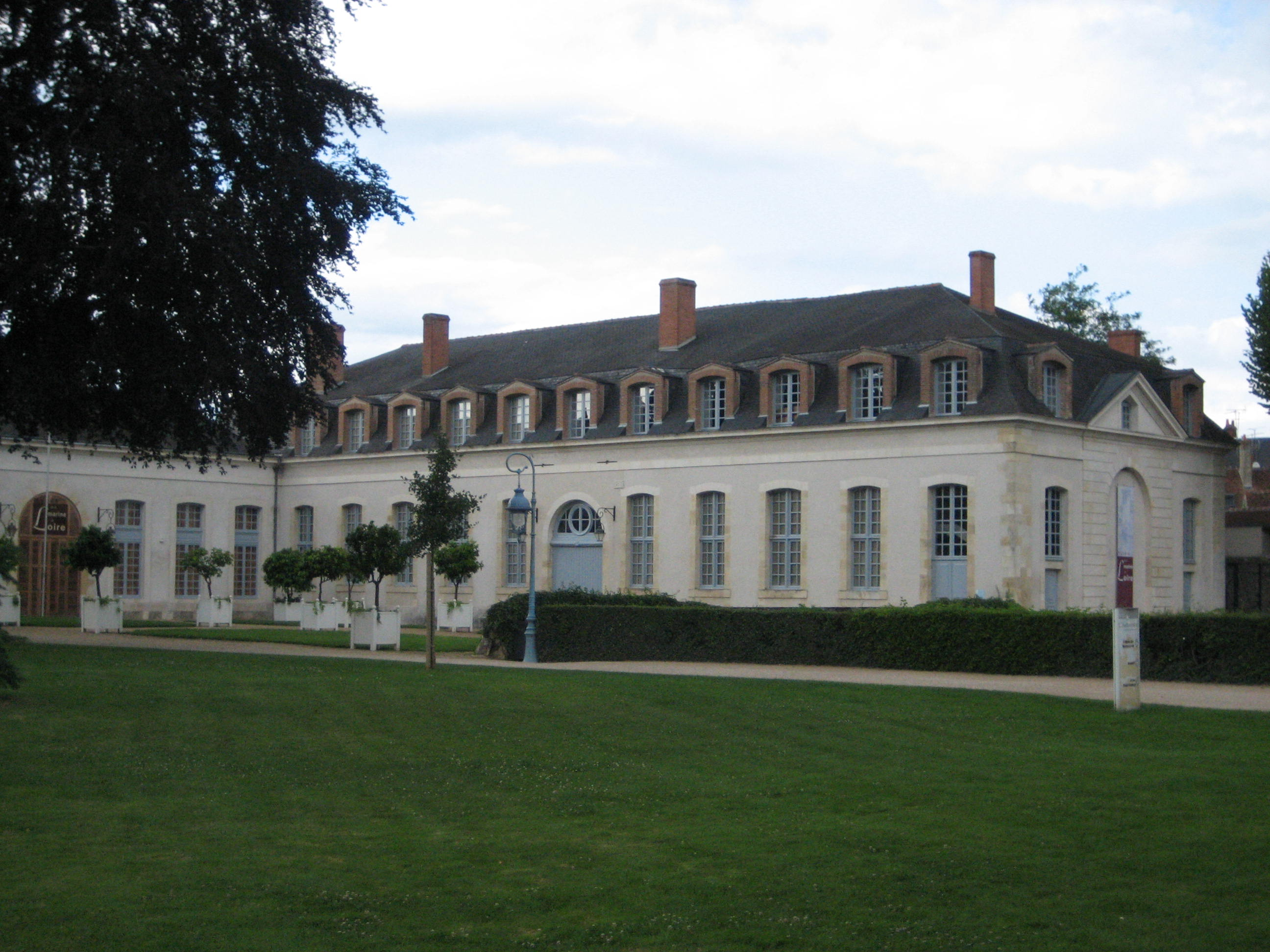 Musée de la marine de Loire, Châteauneuf-sur-Loire, Loiret, Centre, France